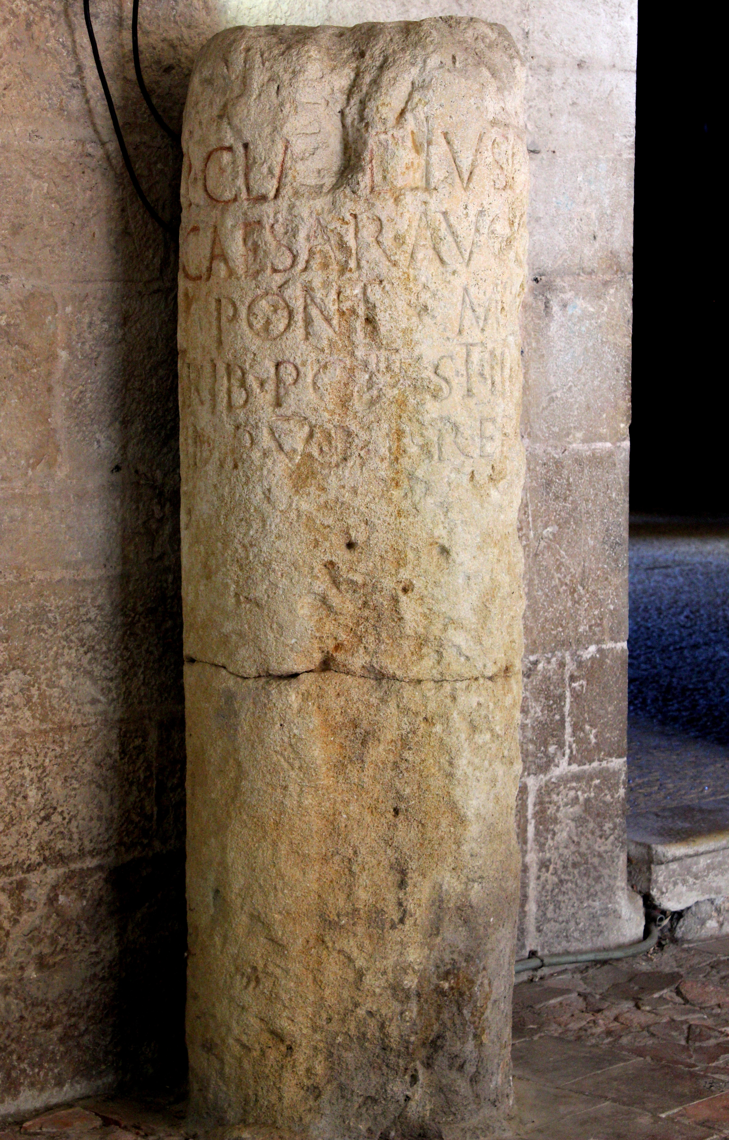 Borne miliaire dédicacée à Claude, en l'an 43-44 ap. J.-C. Elle a été trouvée en 1858 près de la via Aurelia, dans le lit d'un petit ravin du mont Aurélien, à environ 4 km de Saint-Maximin, sur la commune de Pourcieux. Elle est rappidement déplacée dans le cloître de la basilique Sainte-Marie-Madeleine de Saint-Maximin-la-Sainte-Baume, mais une copie serait sur place.Le texte de CIL XVII2, 00051 sur Epigraphik-Datenbank Clauss-Slaby.Cf. Louis Rostan, dans Bulletin monumental, 3e sér., t. 4, vol. 24, Paris, 1858, p. 167-168 (en ligne). Otto Hirschfeld, CIL XII, 1888, inscr. 5476 p. 642 et 858 (en ligne).